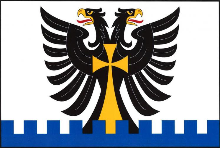 vlajka, Vračovice Orlov, okres Ústí nad Orlicí